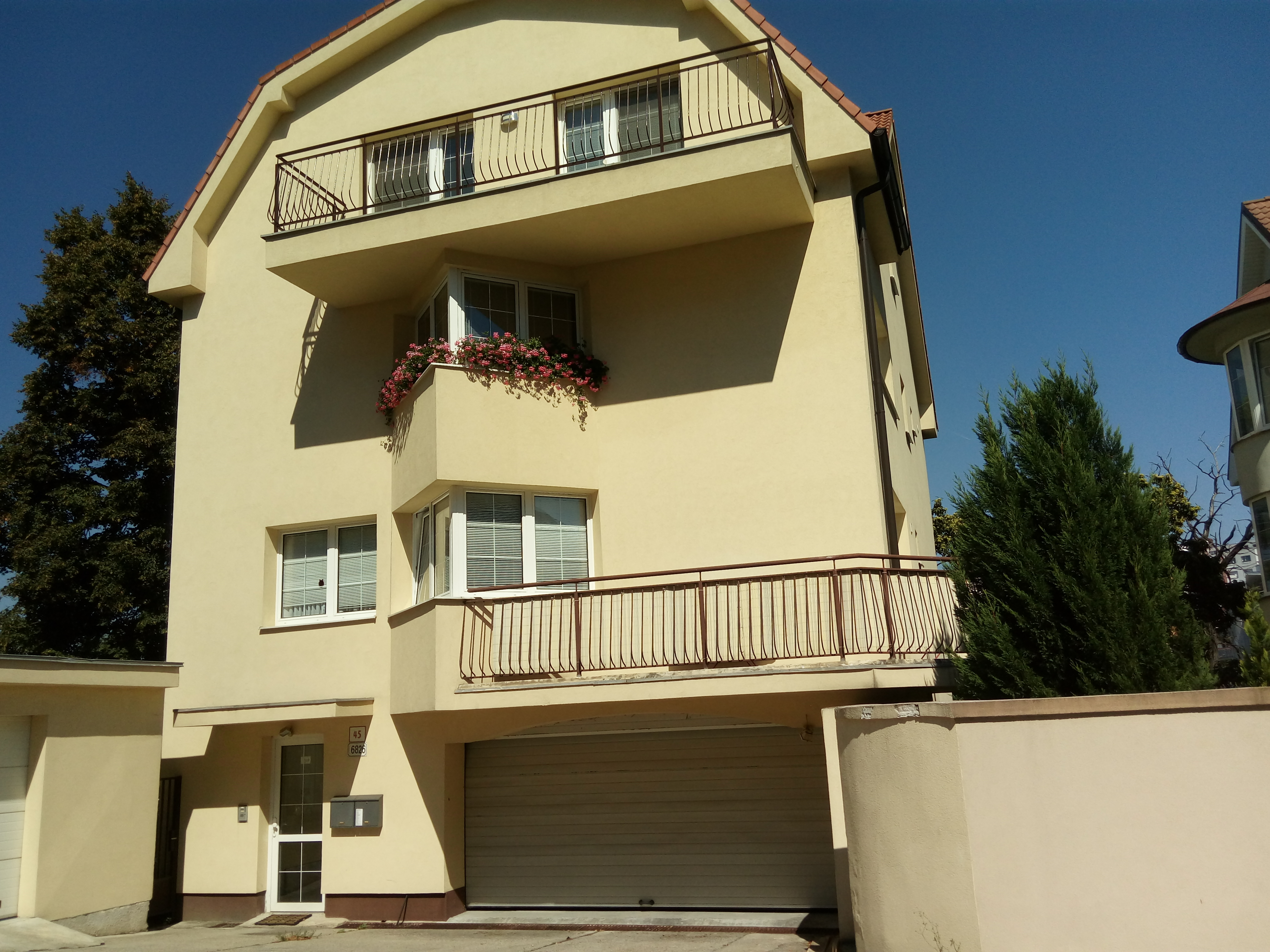 Tichá 45, Staré Mesto, Bratislava